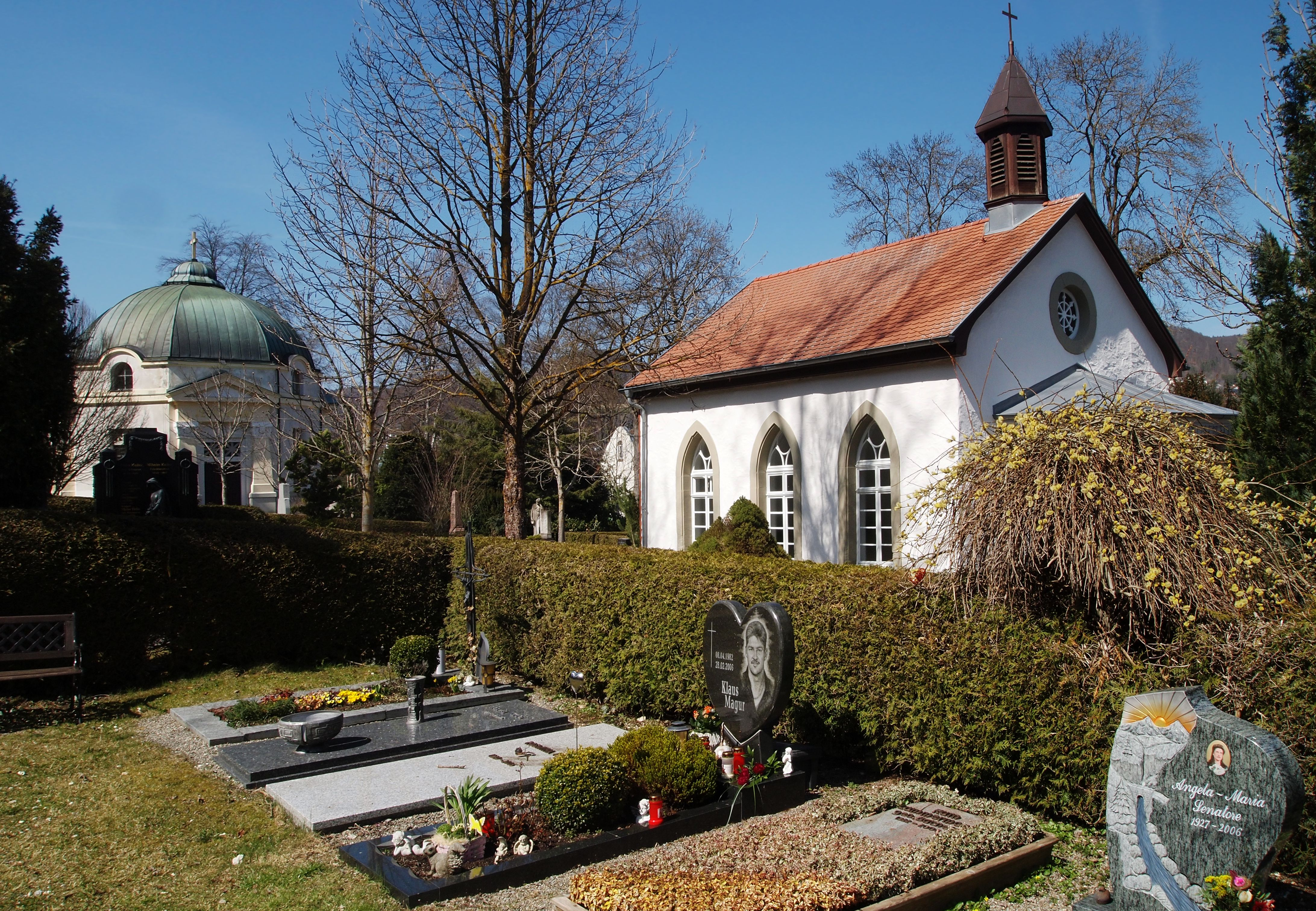 Neue (1898[1]) und alte (1840?) Friedhofskapelle in Ebingen. Beide nur noch als Gedenkstätten genutzt.